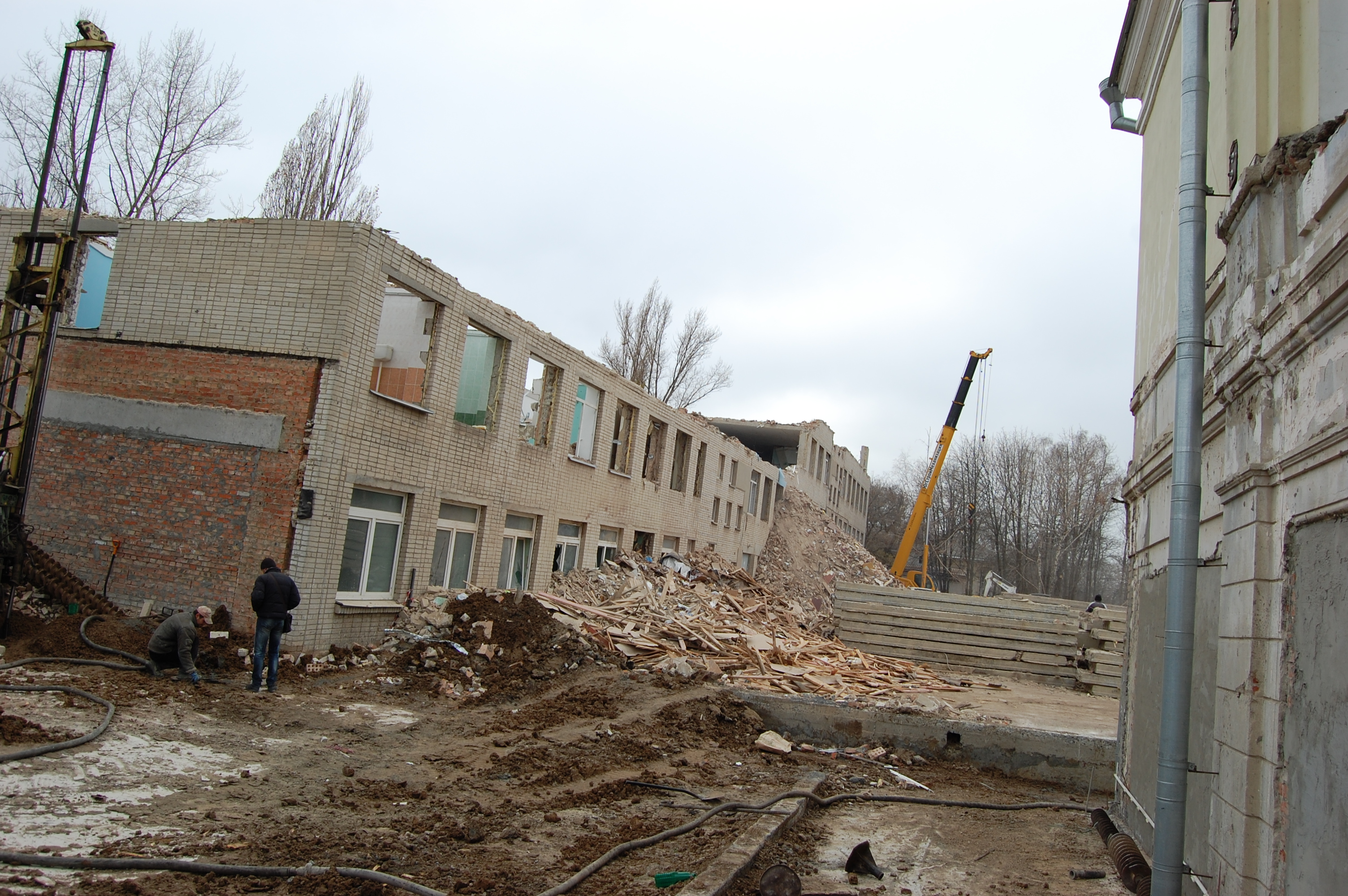 Снос Гимназии №2 им. А.П. Чехова, Таганрог ноябрь 2013 г.